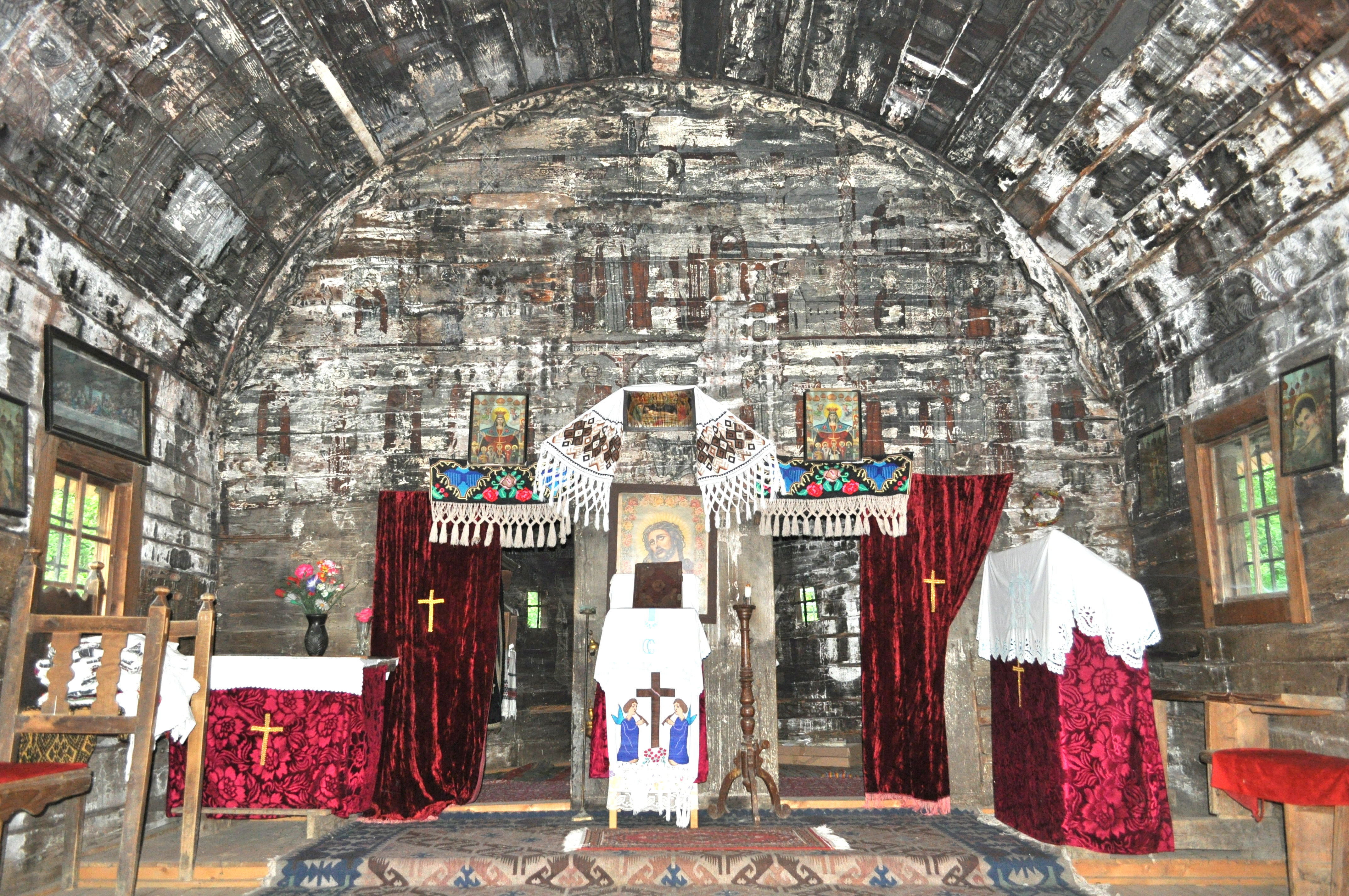 Biserica de lemn din Someșu Rece, județul Cluj